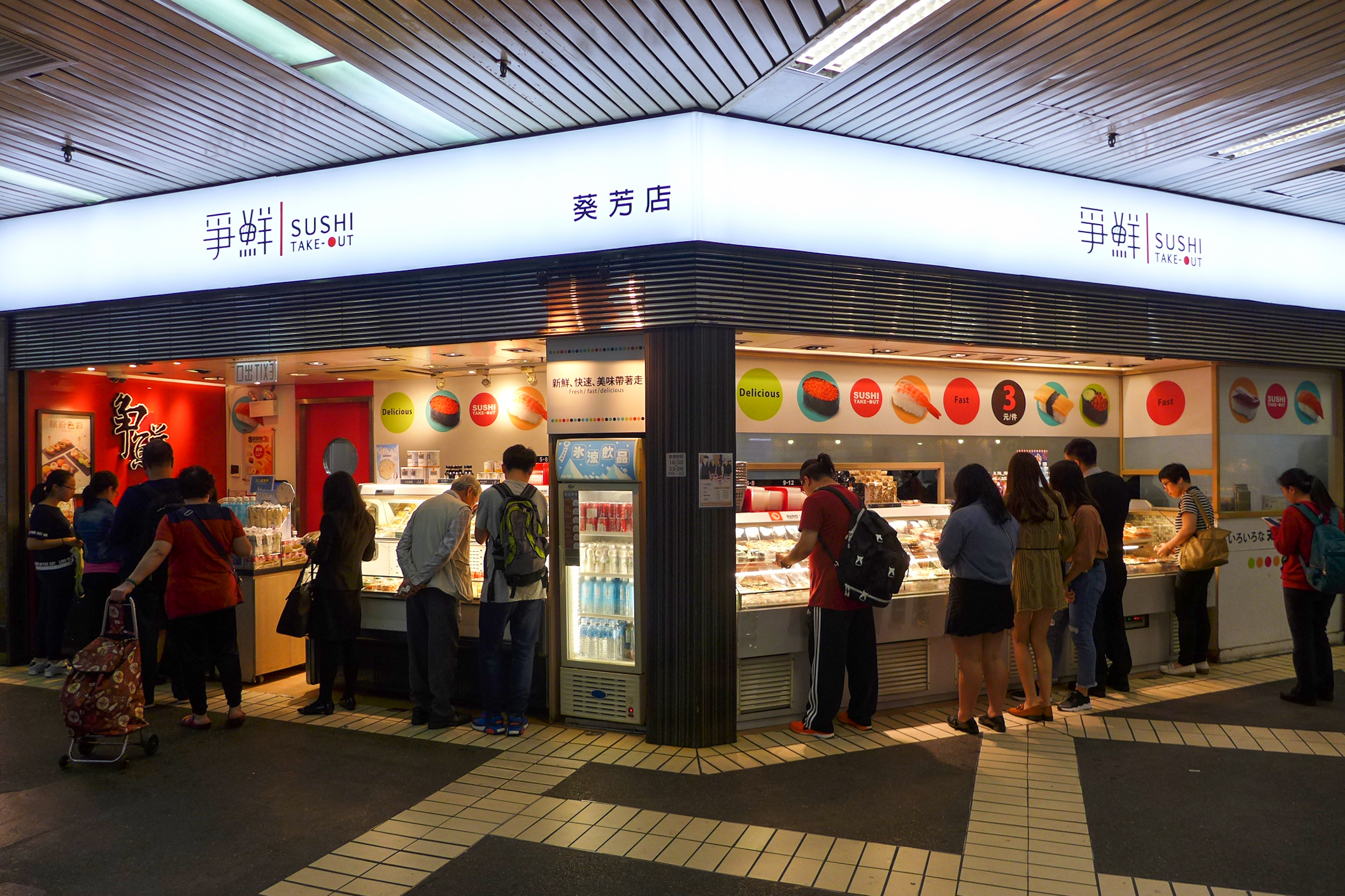 Sushi Take-out shop in Kwai Fong